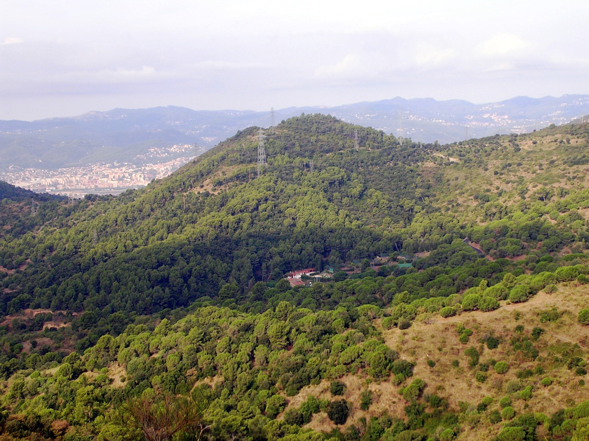 Turó de la Coscollera vist des del Turó d'en Corts (Sant Just Desvern)